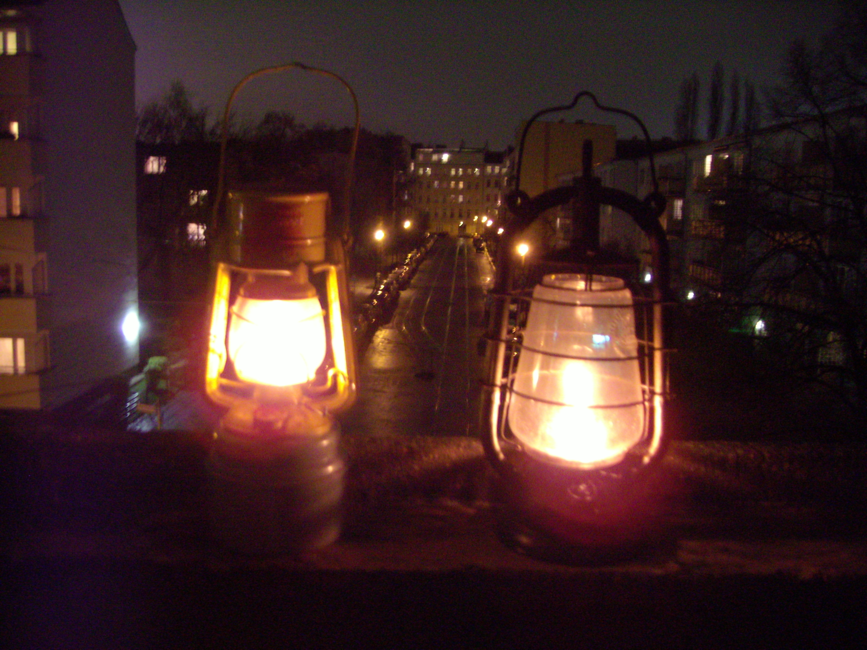 Der Unterschied ziwischen Misch- und Frischluftlaterne